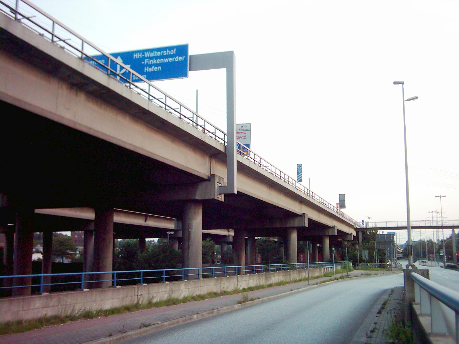 Die Bundesautobahn 7 in Hamburg an der Anschlußstelle Waltershof.